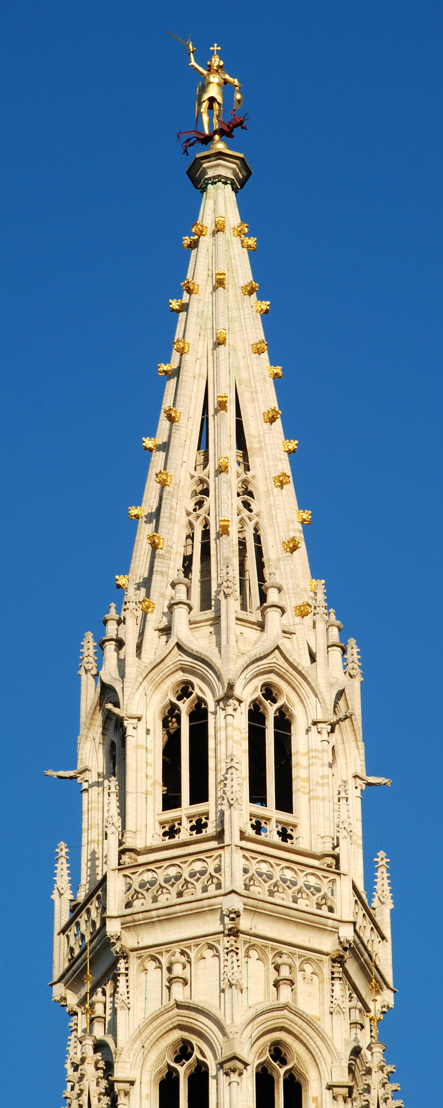 Belgique - Bruxelles - Hôtel de ville de Bruxelles